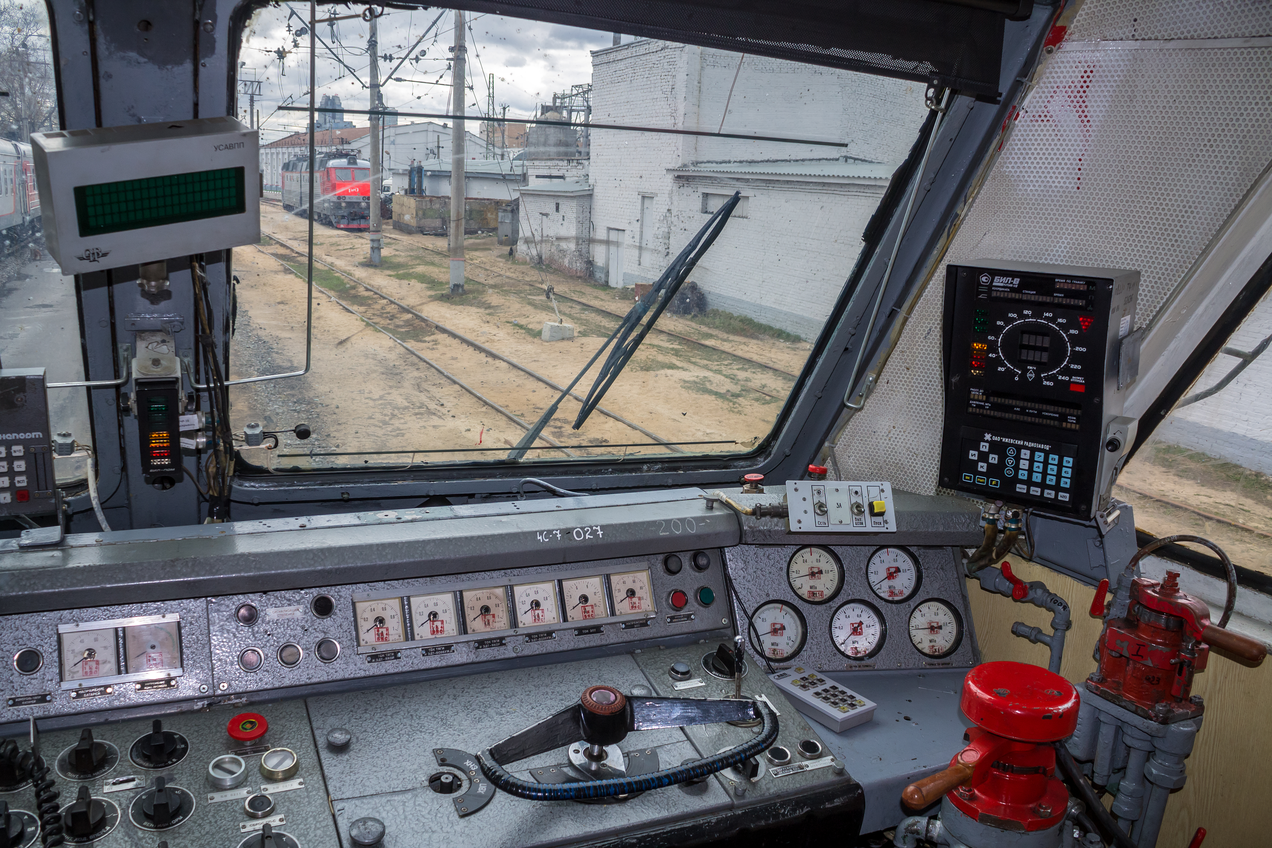 ЧС7-027, депо Москва-Пассажирская-Курская см. фото 693048 в альбоме автора